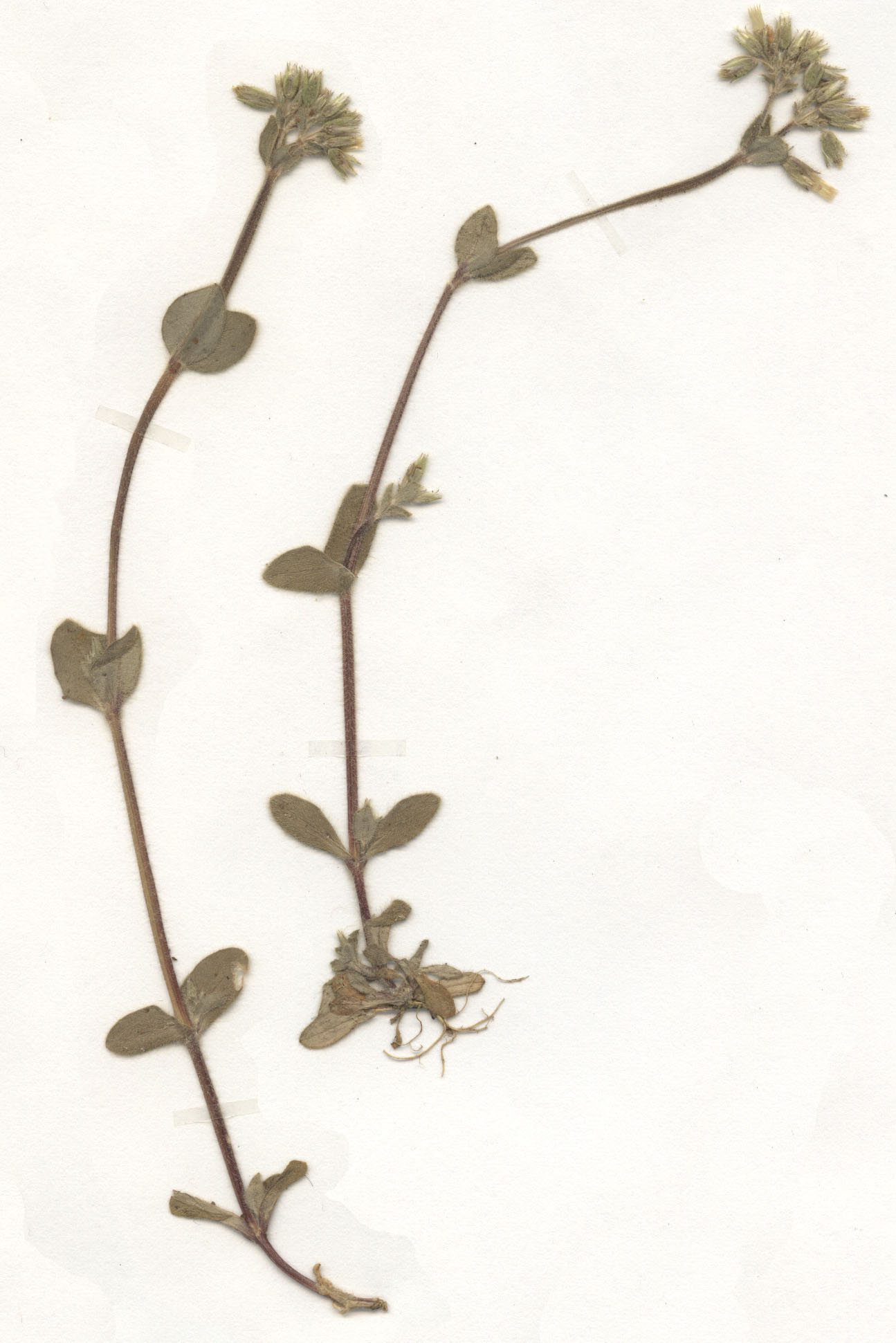 Cerastium glomeratum, eigener Herbarbeleg von 1988, Unterfranken